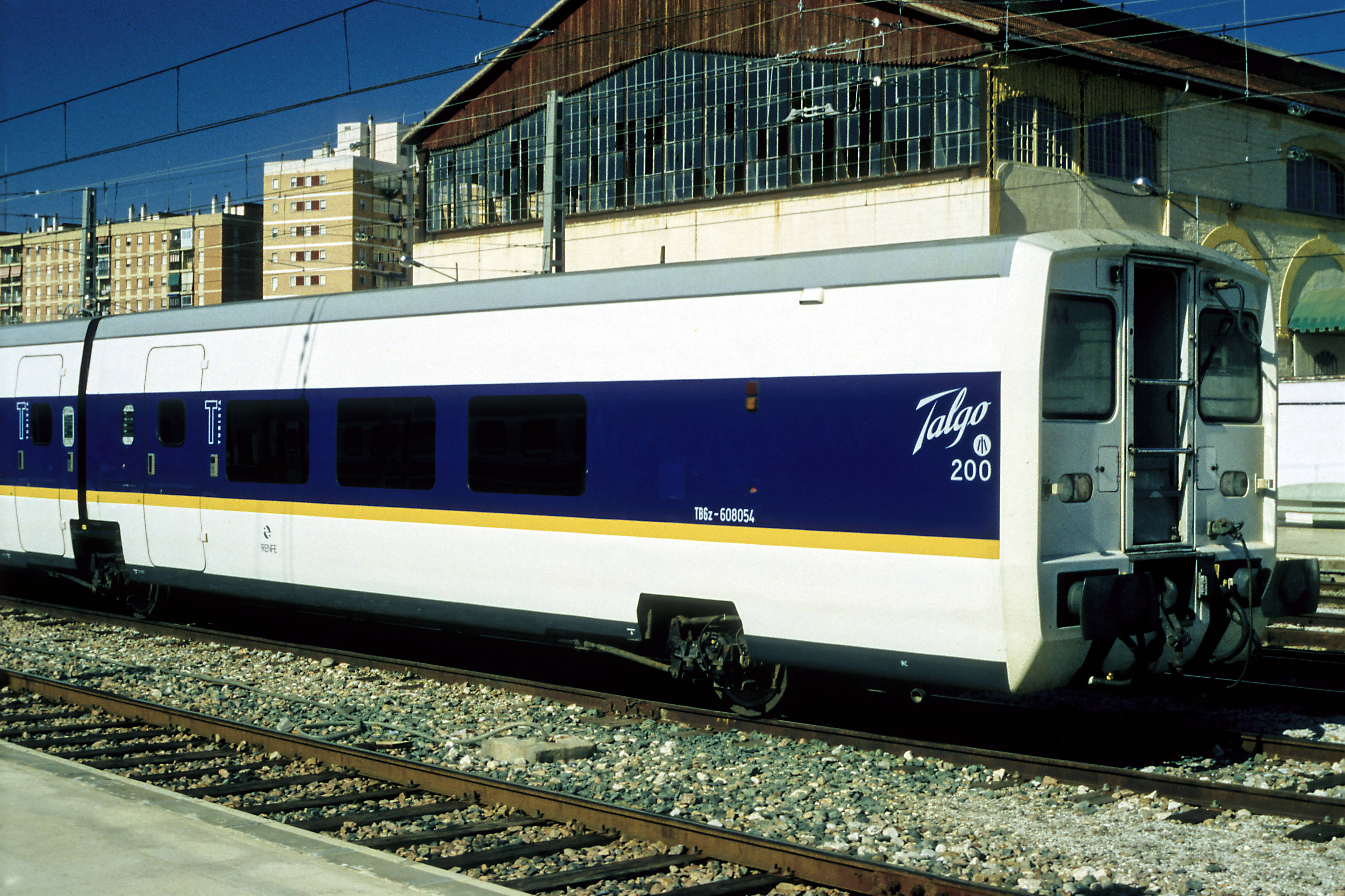 Personenendwagen im noch glänzenden Neulack für die Talgo-200-Verbindungen zwischen Madrid und Málaga, vor der Bereitstellung im alten Bahnhof von Málaga auf Breitspur. Die Bezeichnung »Talgo 200« war der kommerzielle Name für die mit umspurbaren Talgo-6-Einheiten gefahrenen Verbindungen über die Schnellfahrstrecke Madrid–Sevilla ins anschließende Breitspurnetz, beginnend mit Madrid–Málaga.